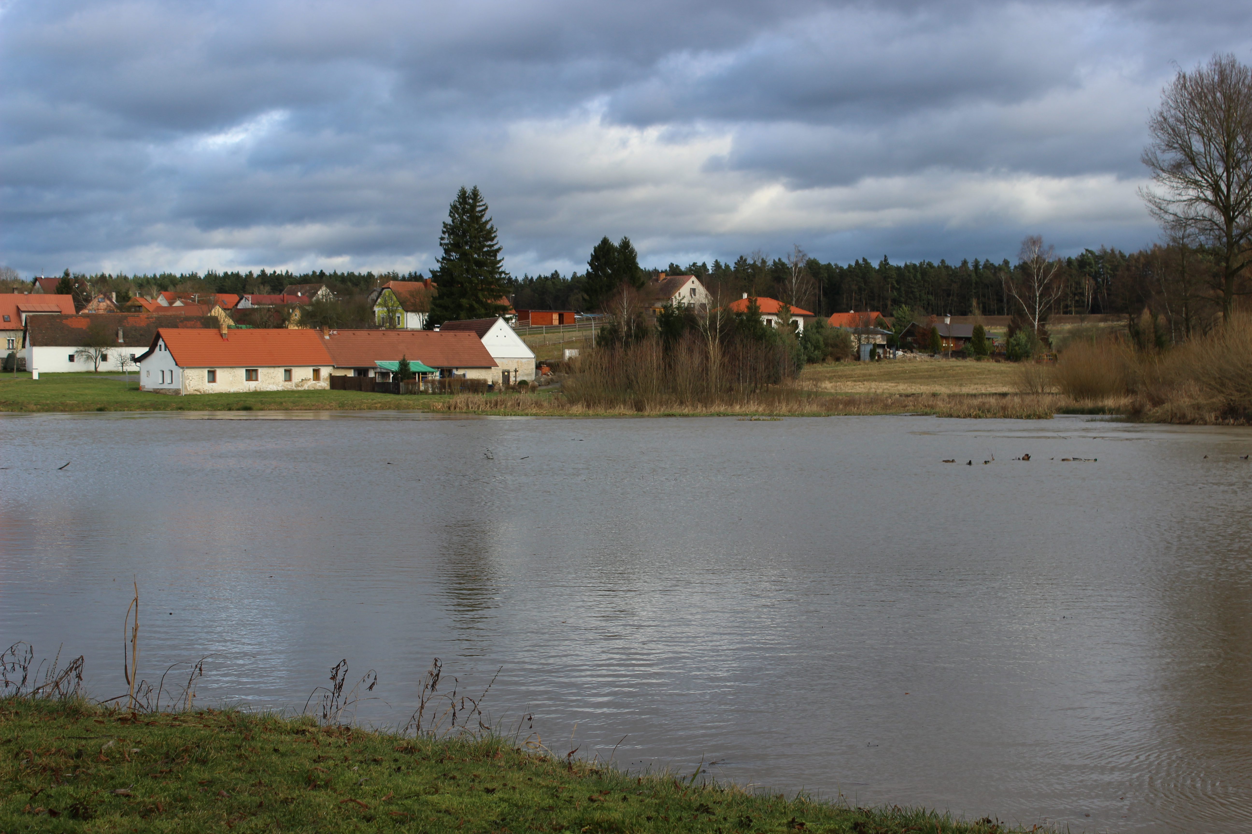 Pohled na Návesní rybník. Dlouhá Lhota (německy Lang Lhota) se nachází v okrese Tábor, kraj Jihočeský. Česká republika.